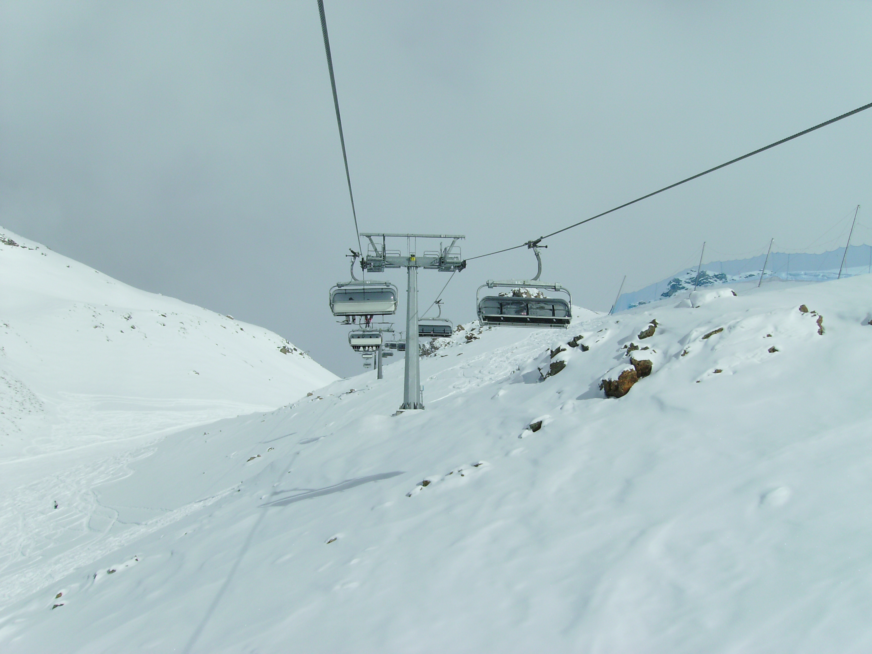 Seggiovia Bec Carré, Valtournenche (Valle d'Aosta)